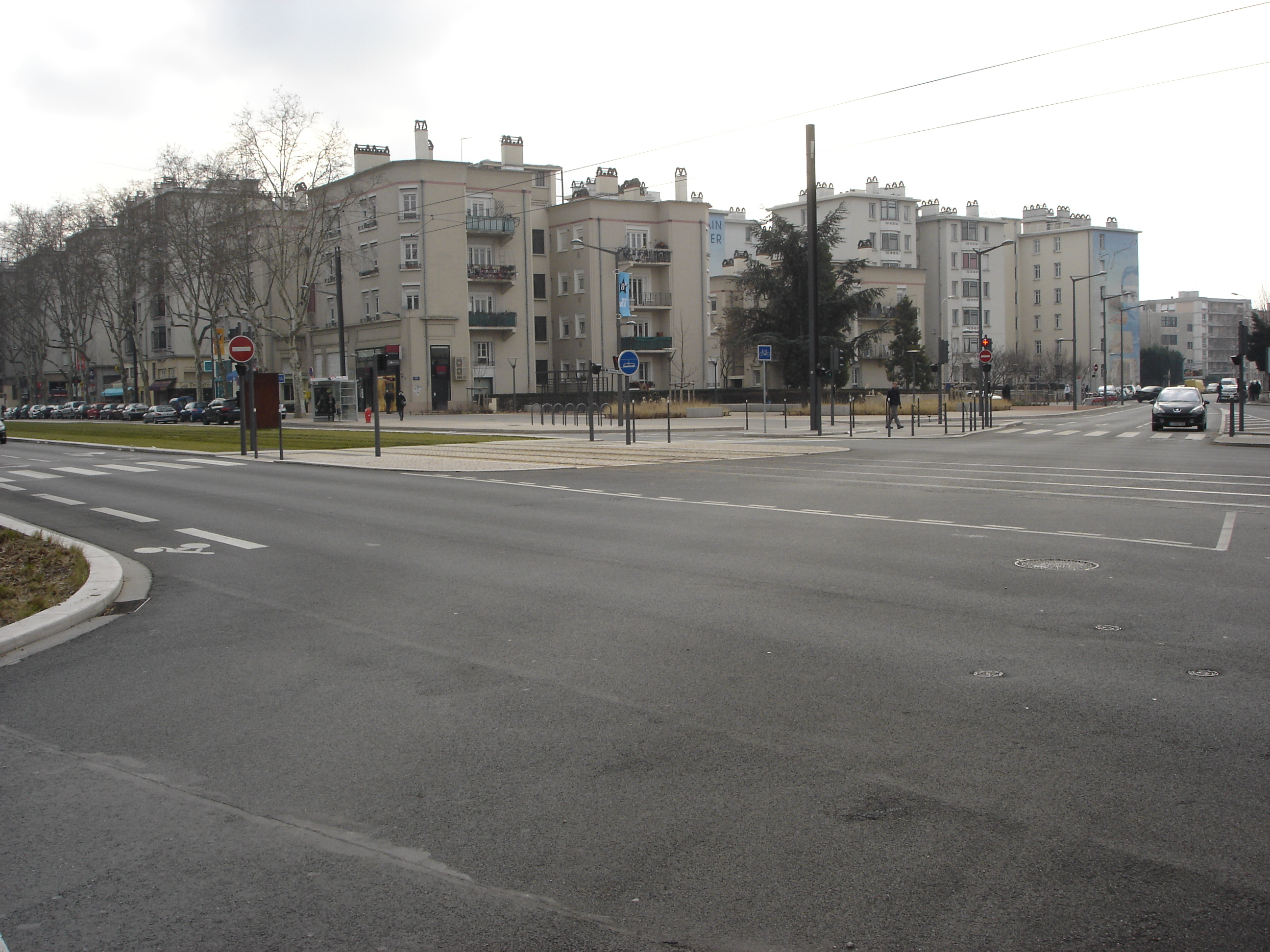 Vue du nord de la cité Tony Garnier dans le quartier des États-unis.